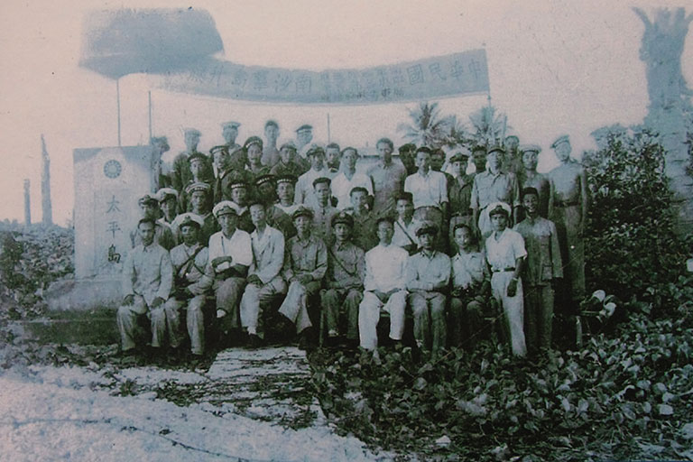 1946年12月、南沙諸島太平島に上陸した中華民国海軍将兵。左より4人目鄭資約、5人目林遵。中文（中国大陆）: 1946年12月14日，民国政府收复太平岛，全体接收官兵在岛上升起国旗并合影留念。画面前排左四为国民政府内政部代表郑资约，前排左五为支队指挥官林遵，前排右四则为南沙群岛接收专员麦蕴瑜。